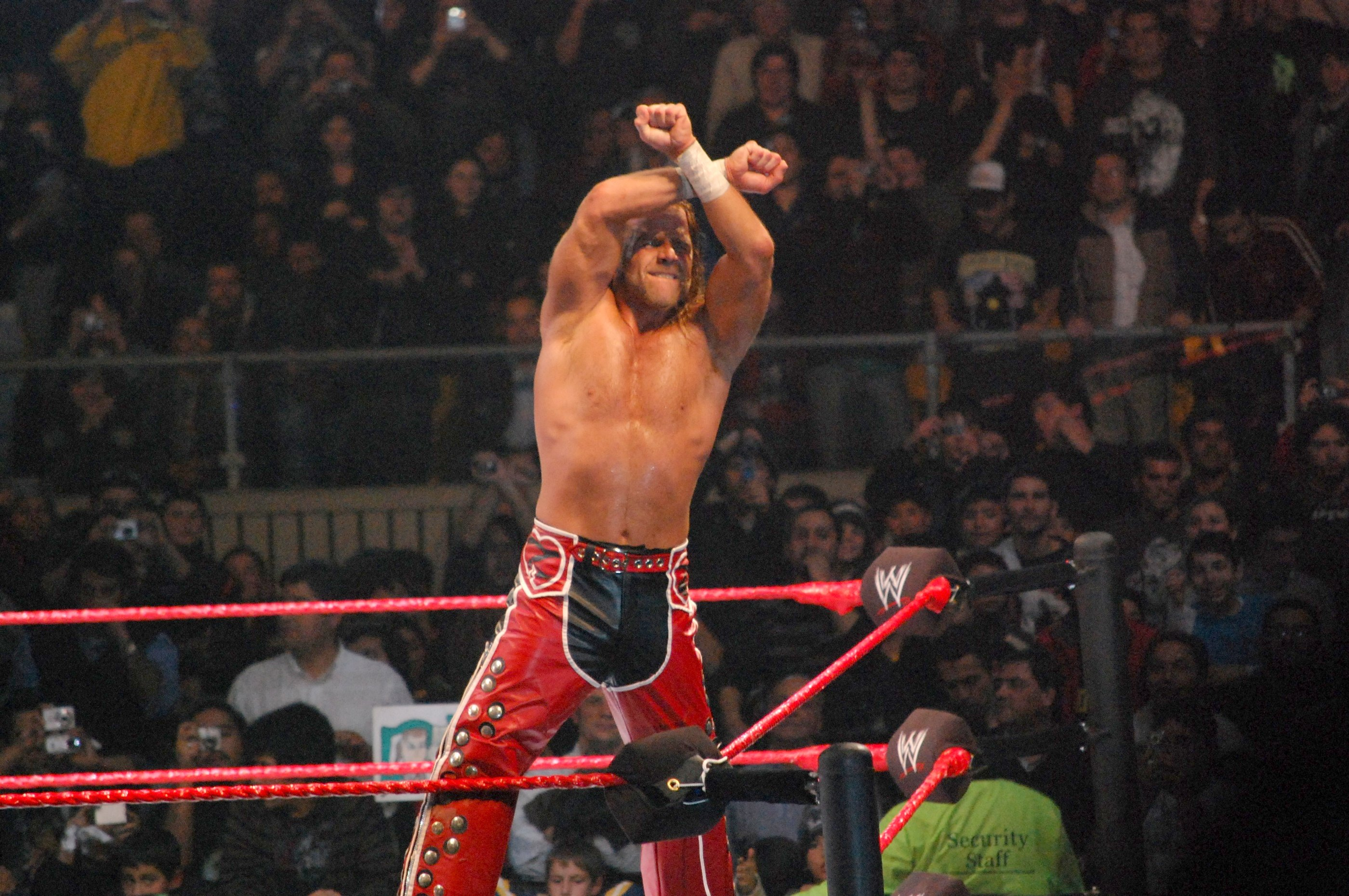 Shawn Michaels effectue le X du clan D-Generation X avec ses bras.